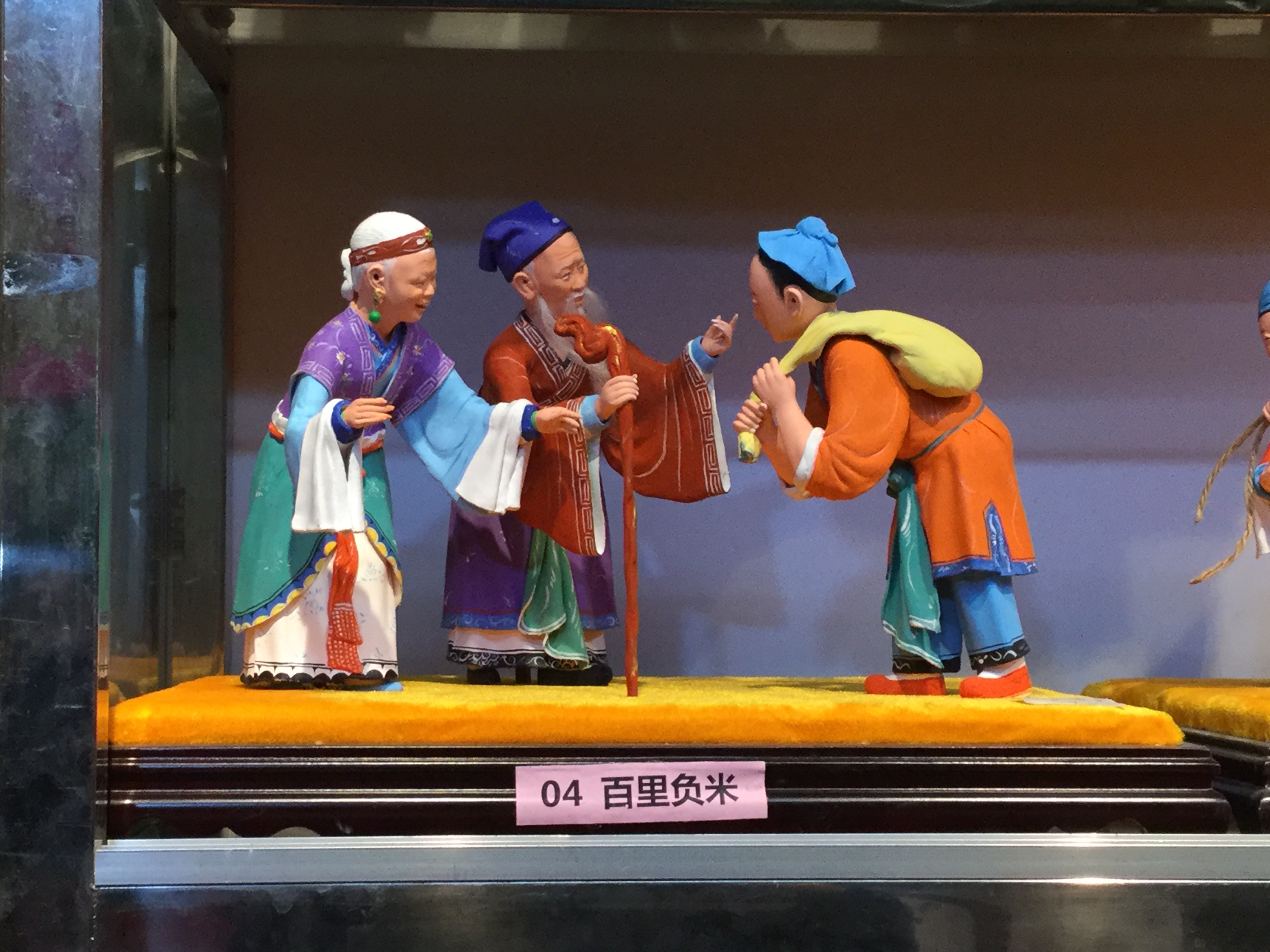 翁仔灯《百里负米》，摄于2018年3月2日。